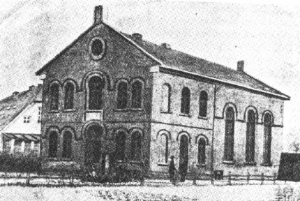 Zeichnung der ehemaligen Synagoge in Verden (Aller)